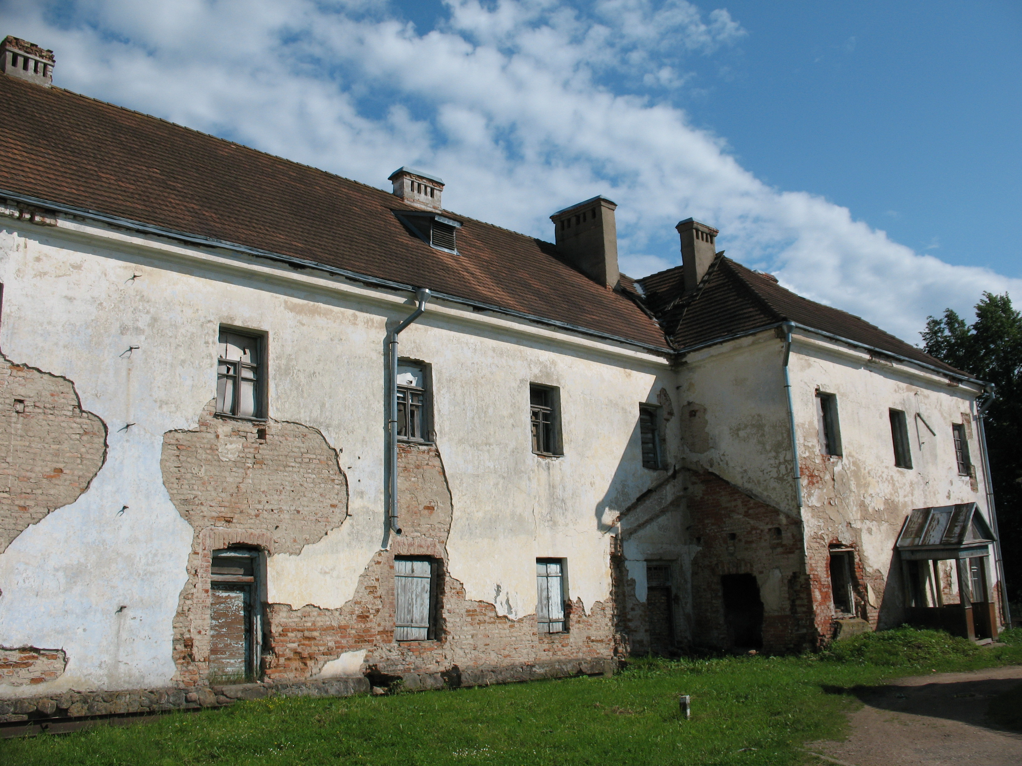 Беларуская (тарашкевіца): Ансамбль кляштара францысканцаў: касьцёл Яна Хрысьціцеля росьпіс алтарнай сьцяны касьцёла жылы корпус агароджа з брамай-званіцай. в. Гальшаны This is a photo of Belarusian heritage monument. Reference number: 412Г000063 ( WLM)